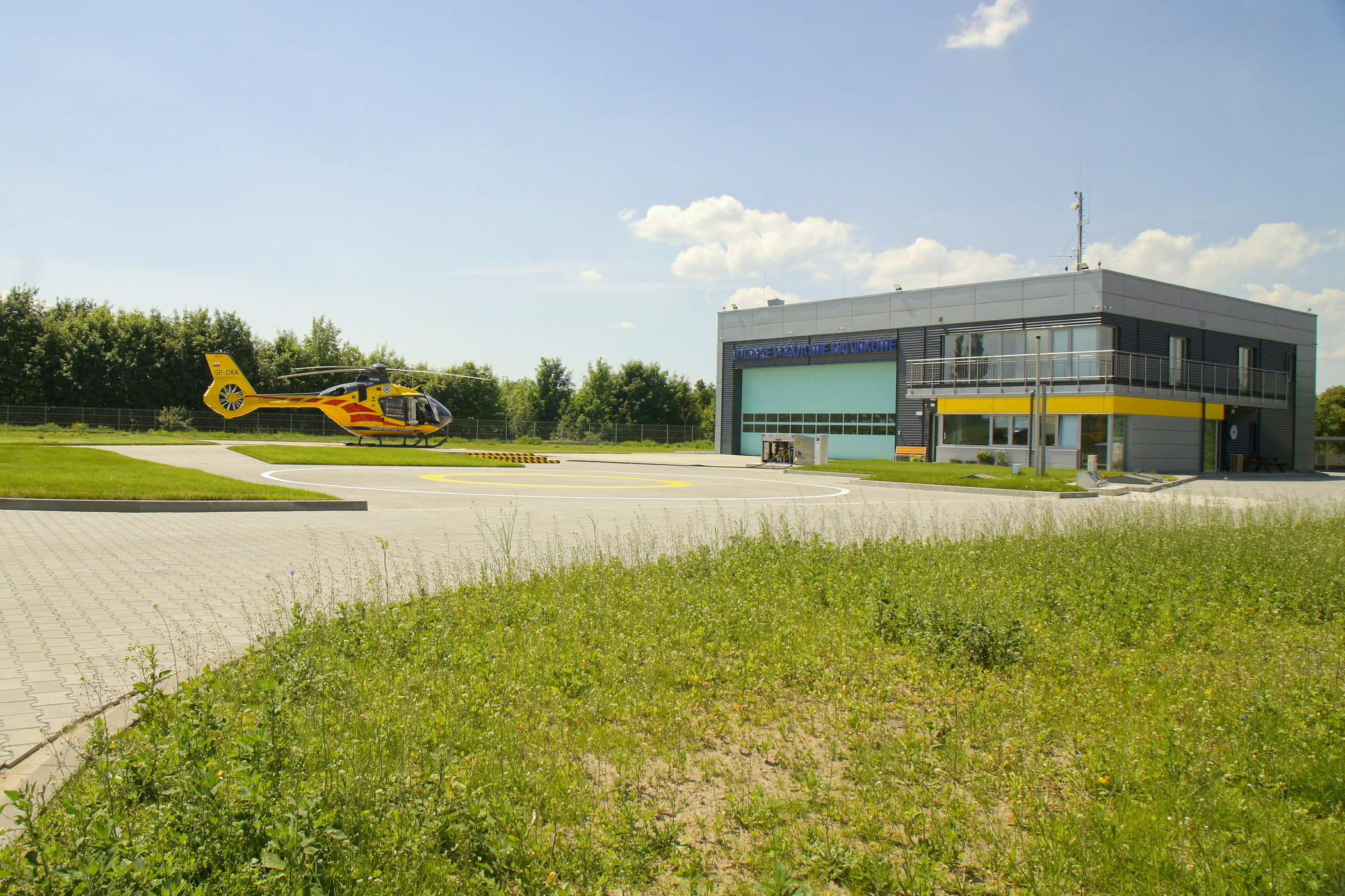 HEMS (ratownik 24) - baza śmigłowca LPR przy szpitalu w Gorzowie Wlkp. przy ul. Dekerta.(na zdjęciu śmigłowiec SP-DXA). Od listopada 2016 r. do maja 2019 r. baza funkcjonowała w formie tymczasowej jako hangar namiotowy i "domek pilota" w kontenerze. Uruchomienie stałej bazy nastąpiło 27 maja 2019 r.